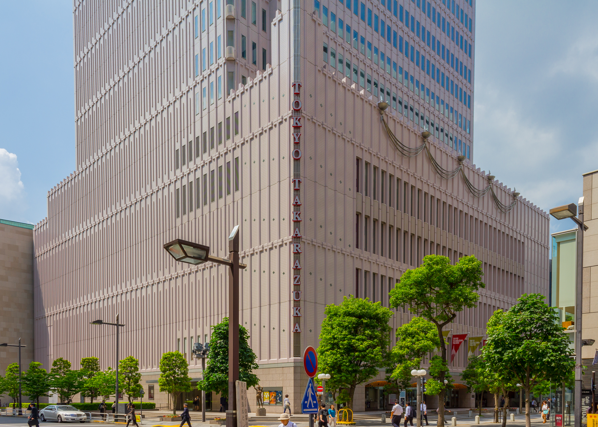 東京宝塚劇場（東京都千代田区）